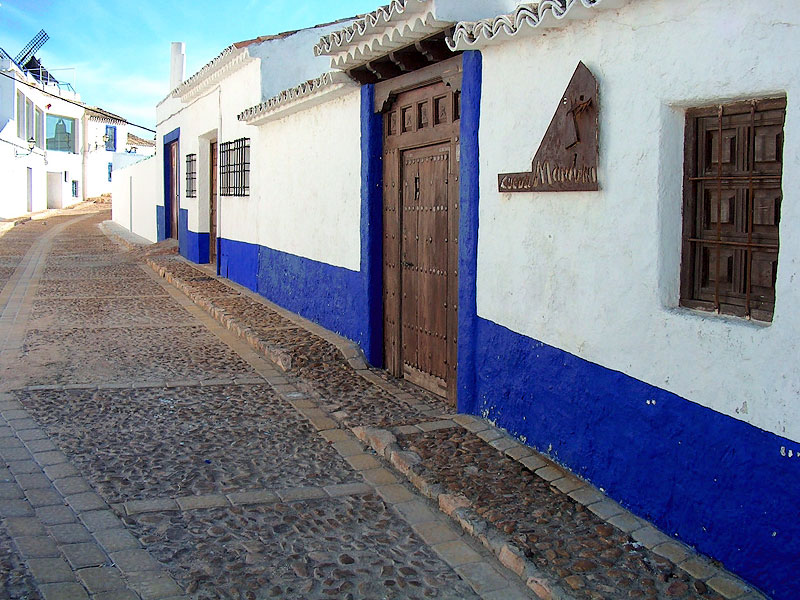 Rincón de la localidad.